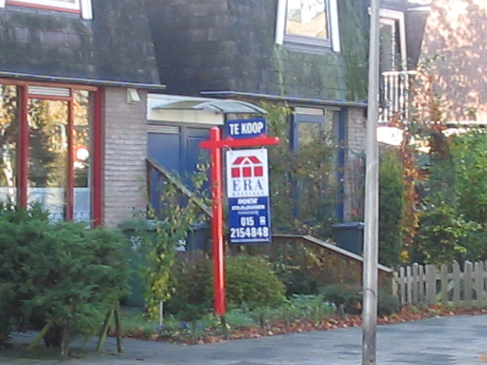 Woningen worden meestal met hulp van een makelaar verkocht. Koopwoning.